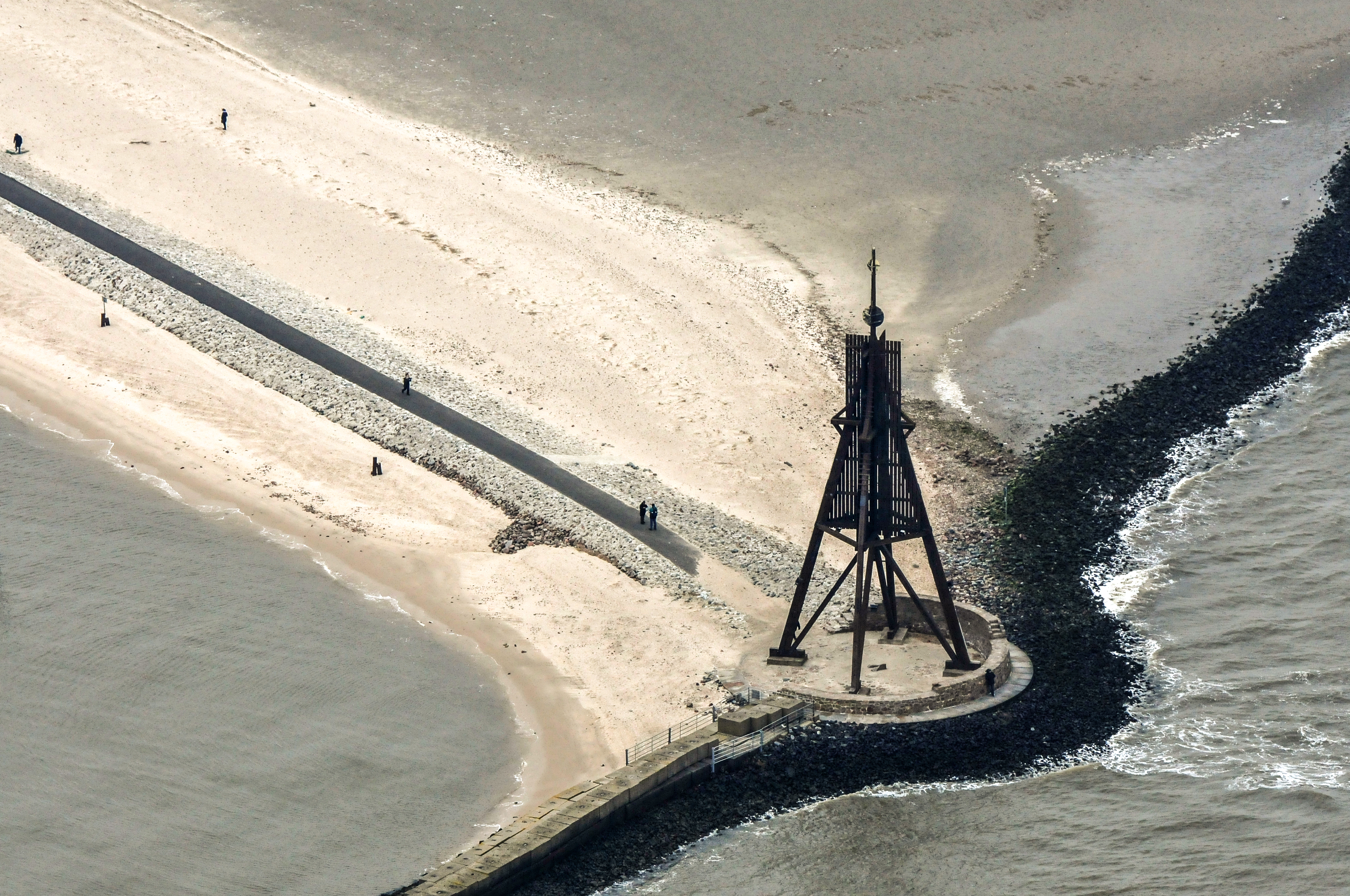 Die Kugelbake vor Cuxhaven. Fotoflugkurs Cuxhaven 2013 22. - 24. Februar 2013 vom Flugplatz Nordholz-Spieka Mit Unterstützung durch die Sportfluggruppe Nordholz/Cuxhaven e. V. The making of this document was supported by the Community-Budget of Wikimedia Germany. The making of this work was supported by Wikimedia Austria. For other files made with the support of Wikimedia Austria, please see the category Supported by Wikimedia Österreich.